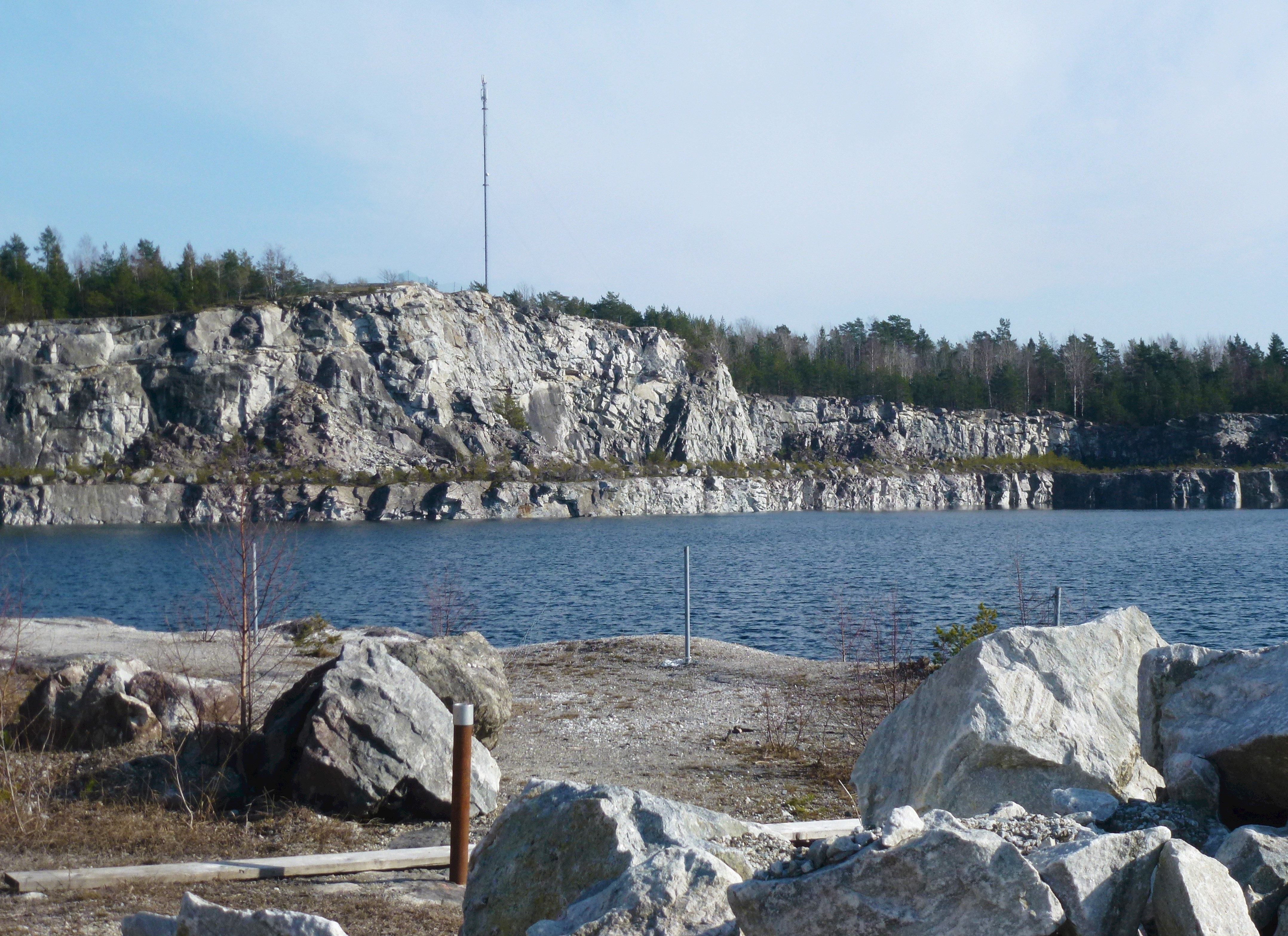 Stora Vika cementfabrik, del av roterugnen